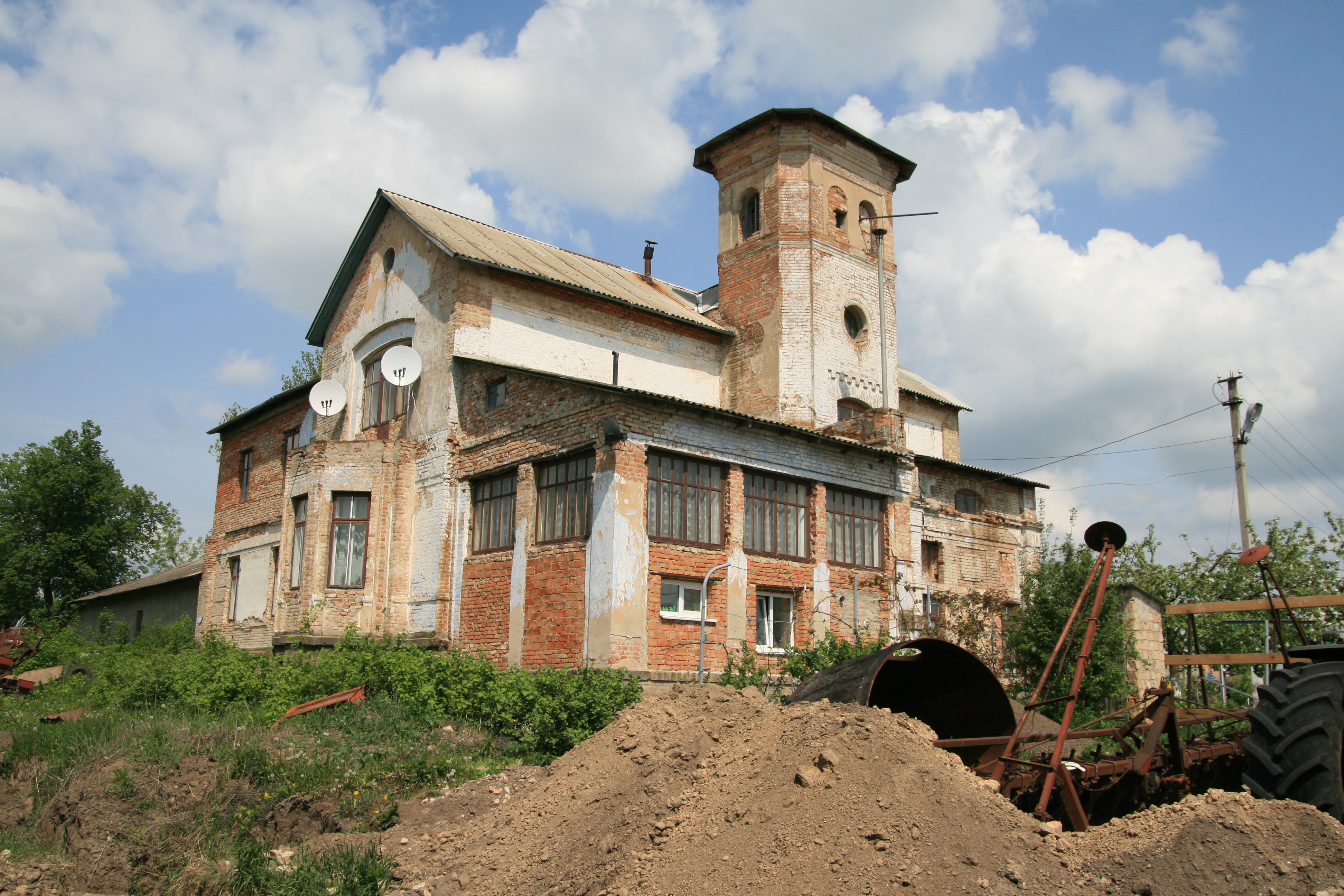 Ансамбль садиби (мур.), село Стадниця